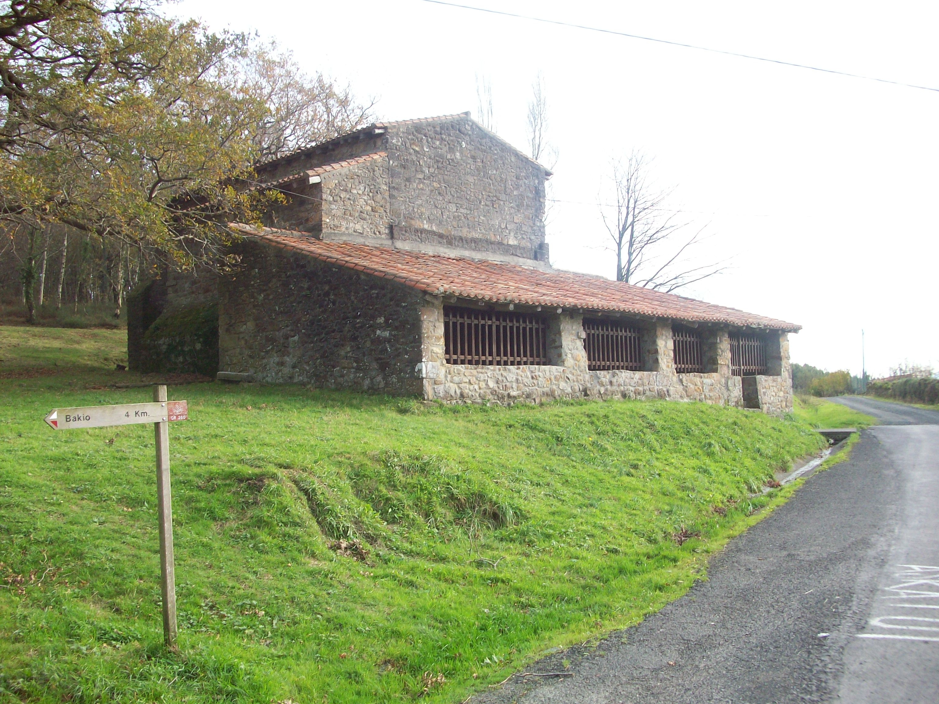 Mungia eta Bakio artean dagoen Zumetxagako baseliza.